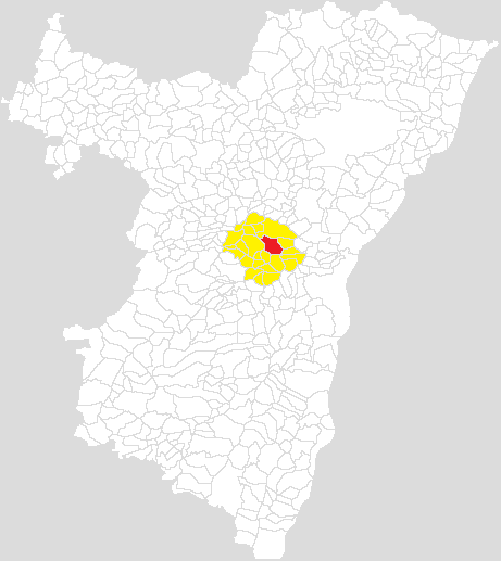 Communauté de communes du Kochersberg